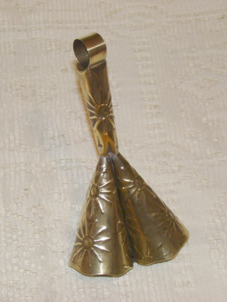 Adjá usado no candomblé